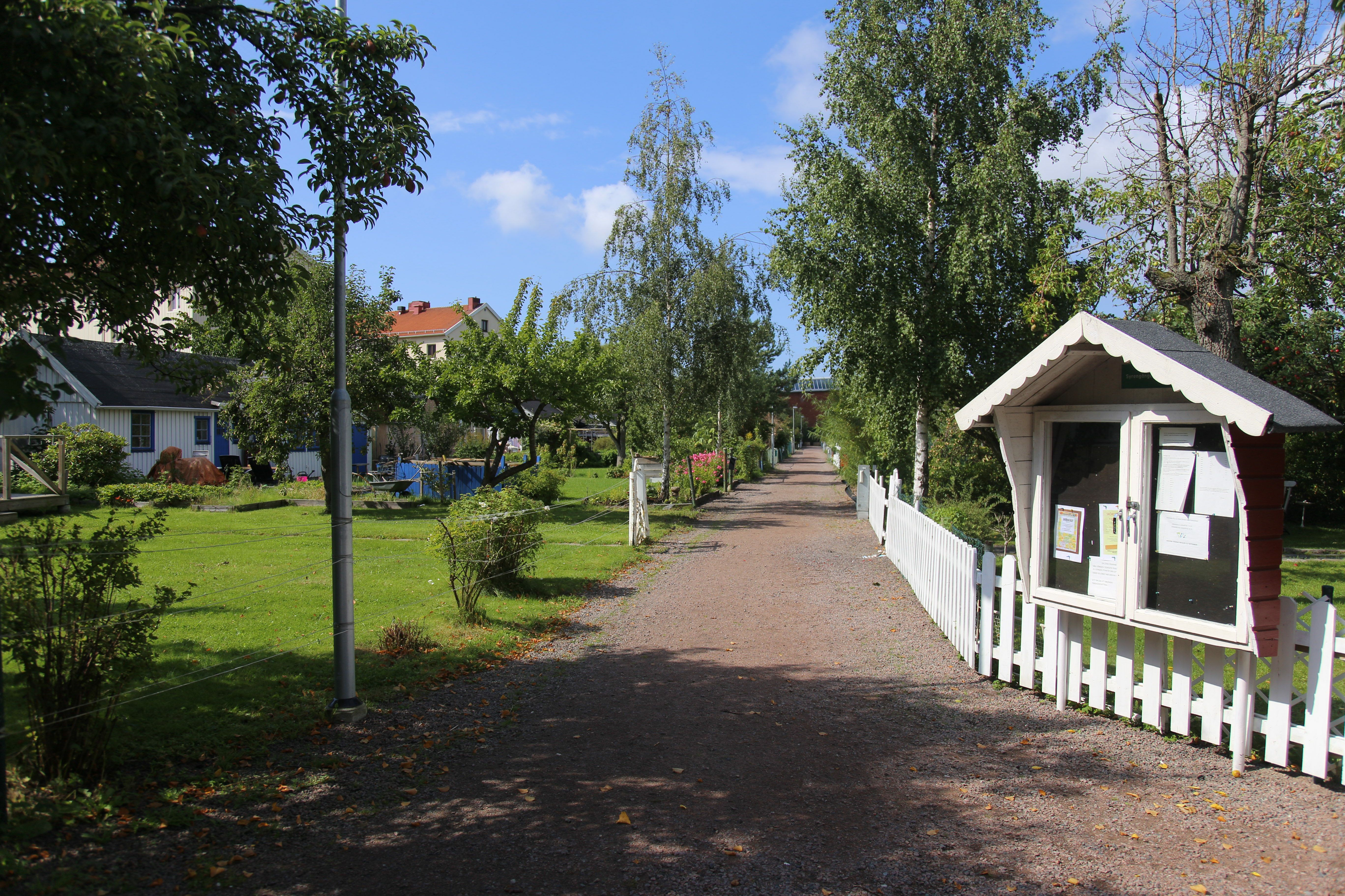 Rambergsstadens koloniträdgårdar, södra gatan, vy västerut